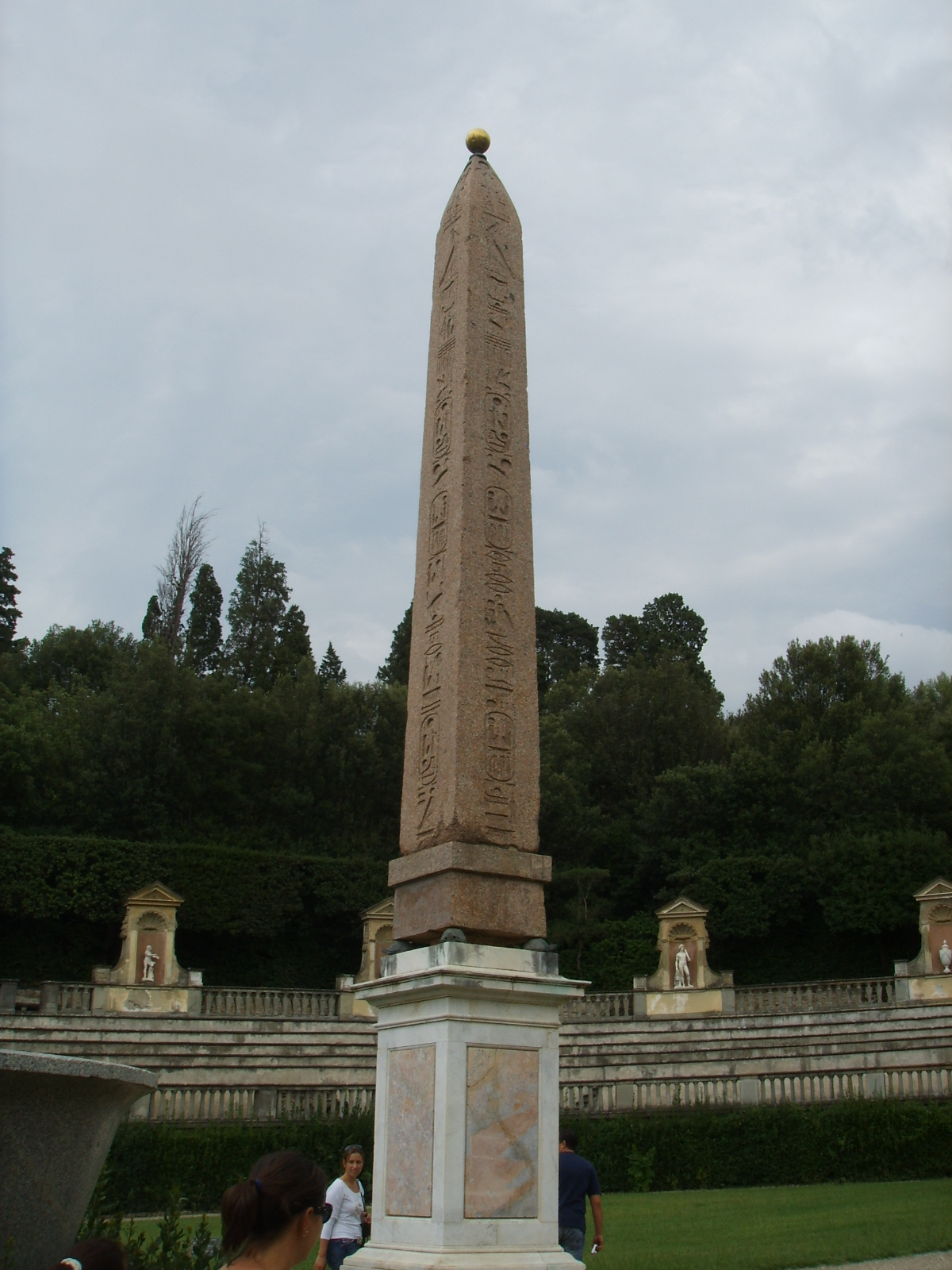 Boboli, obelisco